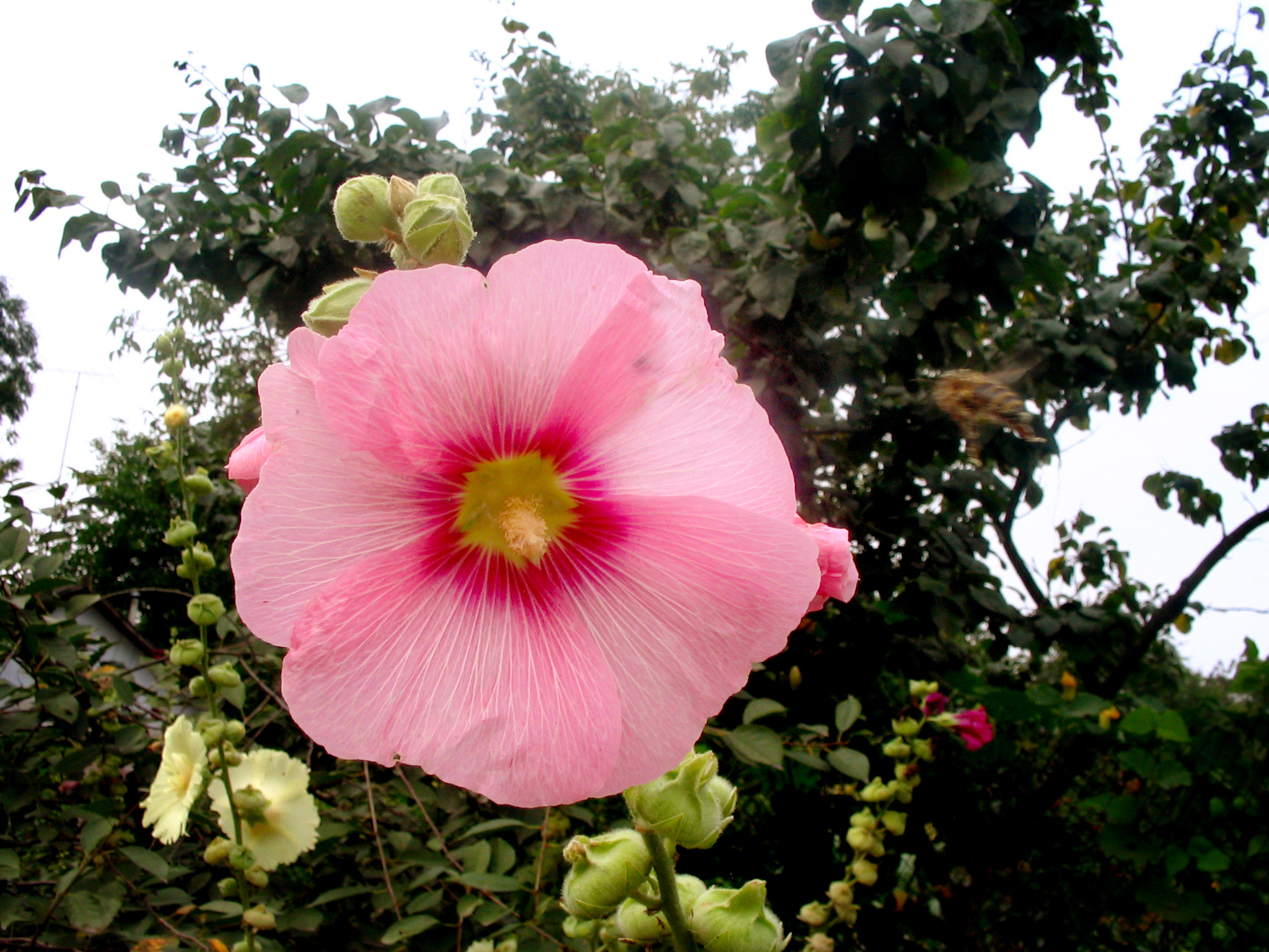 Квітка Мальви. Україна